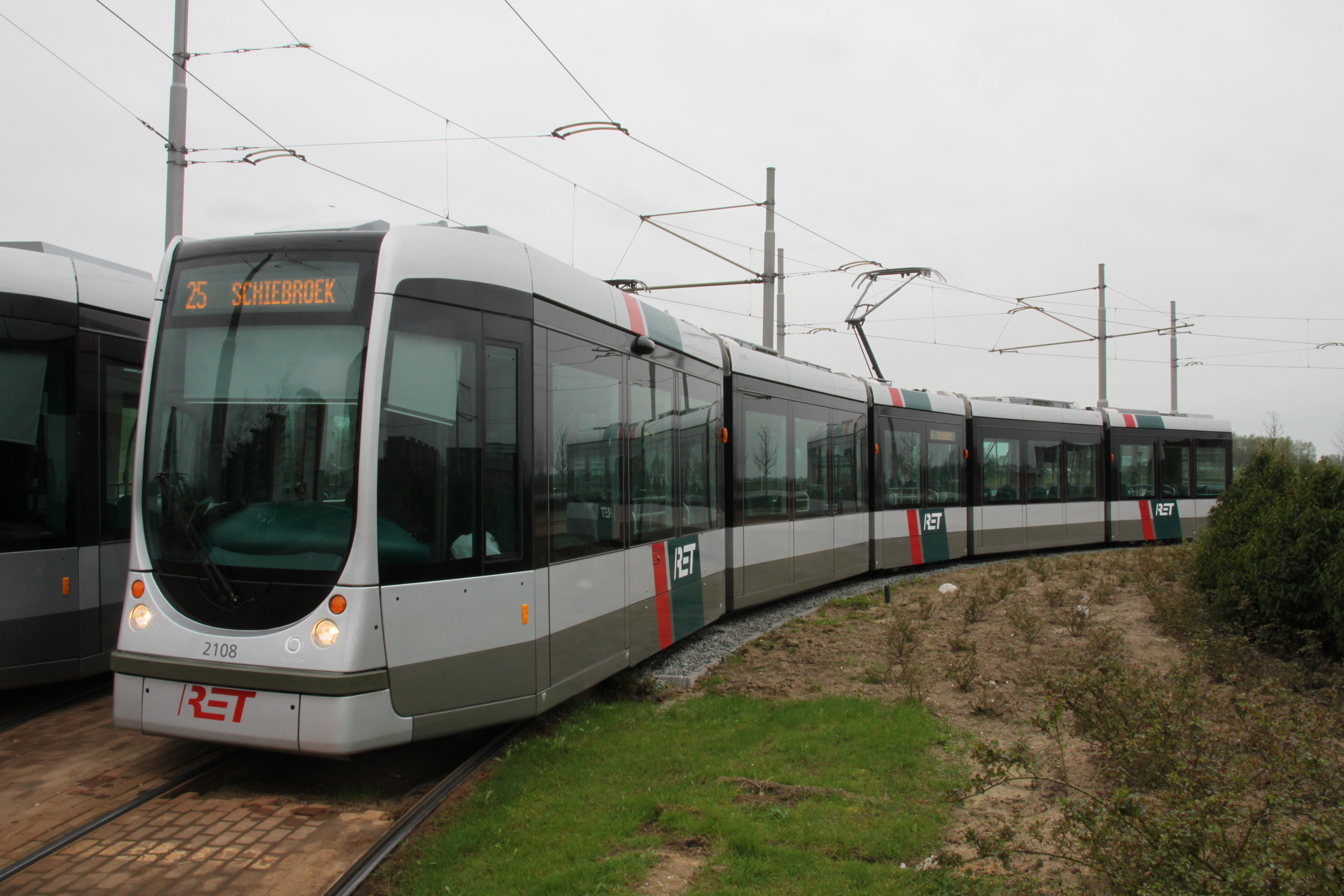 Foto van een Citadis in Rotterdam uit de 2100-serie.